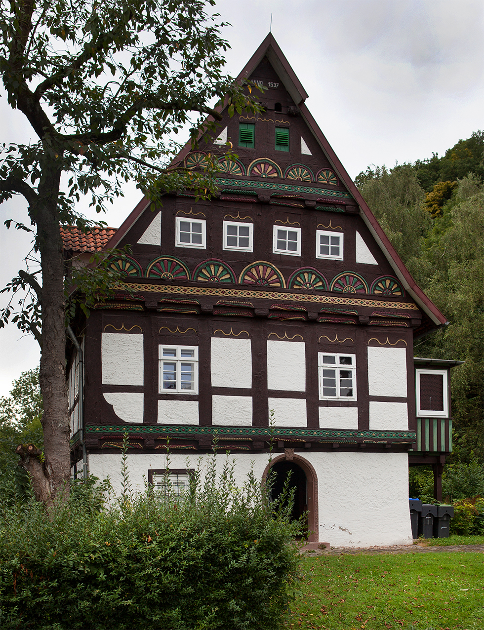 Schlossmühle von 1537 und Ehemaliges Forsthaus Heidelbeck (Heute: Wald- und Forstmuseum) This is a photograph of an architectural monument.